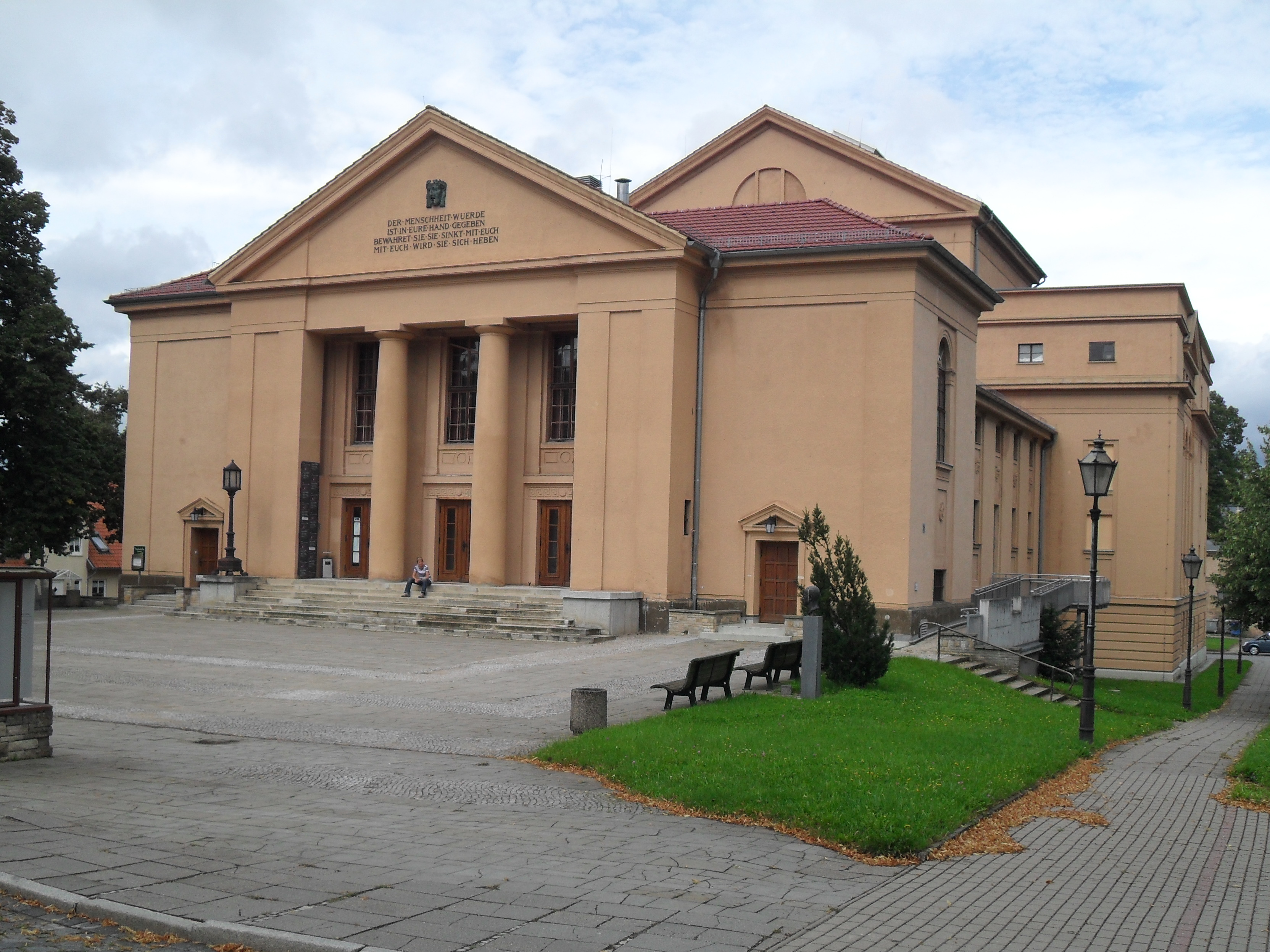 Das Landestheater Neustrelitz wird als Mehrspartenhaus betrieben und bietet im "Großen Haus" 400 Zuschauern Platz .